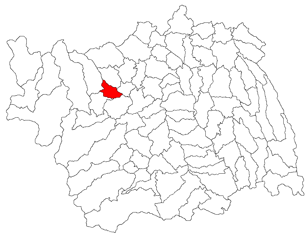 Categorie:Hărţi ale judeţului Bacău